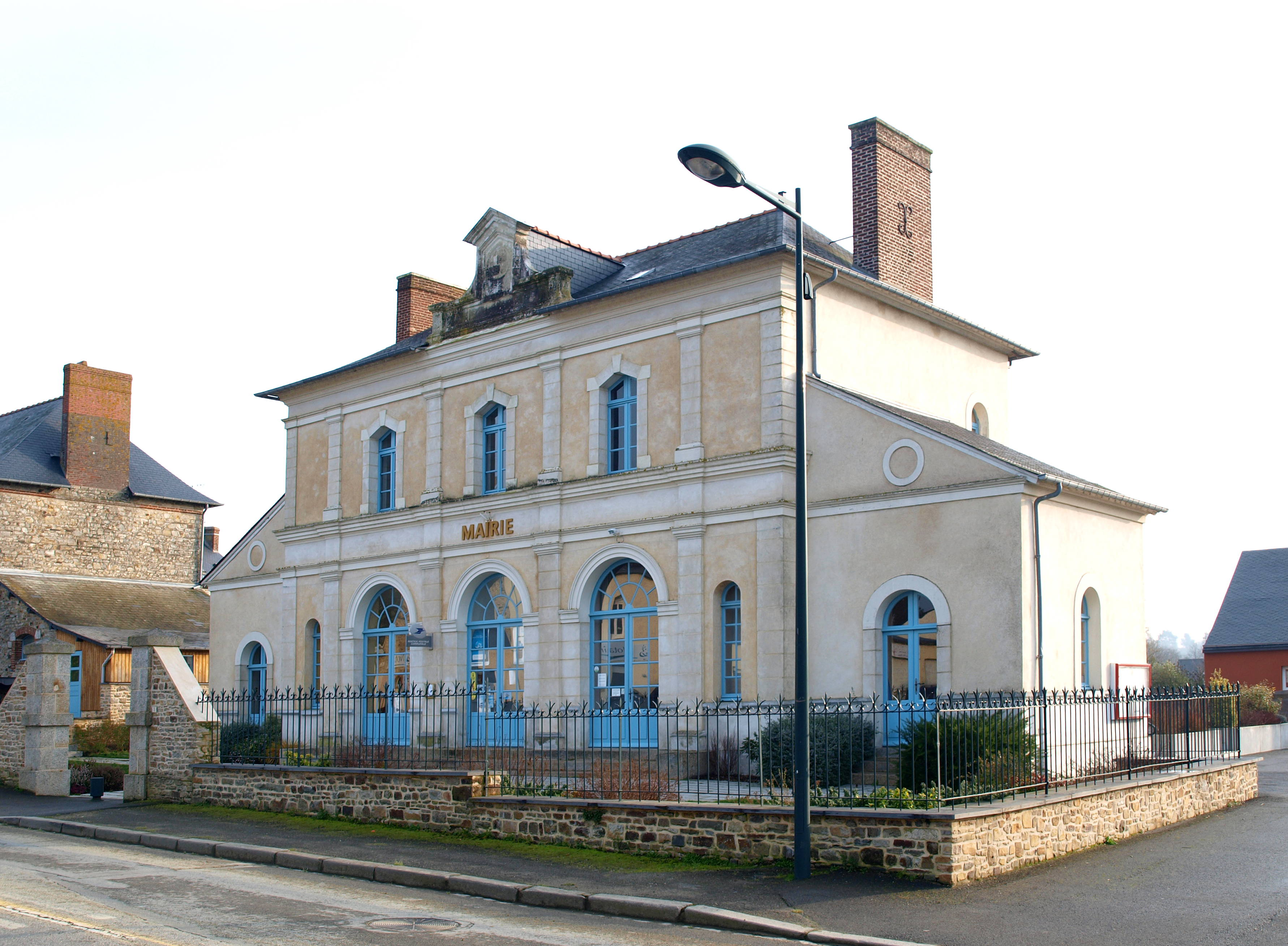 Le Sel-de-Bretagne (Ille-et-Vilaine, France) ; mairie